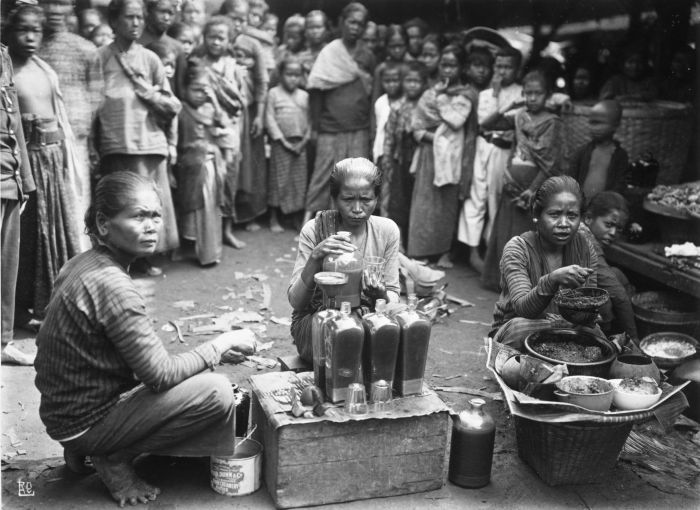 Foto. Zelfmedicatie is en was een belangrijk onderdeel van het gedrag rond ziekte en gezondheid van de bevolking van de Indische Archipel. Het maakt onderdeel uit van het complex dat we doorgaans met de term traditionele geneeskunst aanduiden. Bij de zelfmedicatie zijn kruidendrankjes (djamoe, nu jamu) van grote betekenis. Sommige mensen bereiden deze drankjes zelf, maar doorgaans komt er een in kruiden gespecialiseerde dukun (traditionele genezer, vaak vrouwelijk) aan te pas. Jamu wordt tegenwoordig ook fabrieksmatig klaargemaakt, met als curieus voorbeeld het merk 'Njonja Meneer', dat trouwens al in de koloniale tijd bestond. (P. Boomgaard, 2001). Vrouwen tijdens de bereiding van jamu, een traditioneel geneesmiddel, op de markt te Jogjakarta